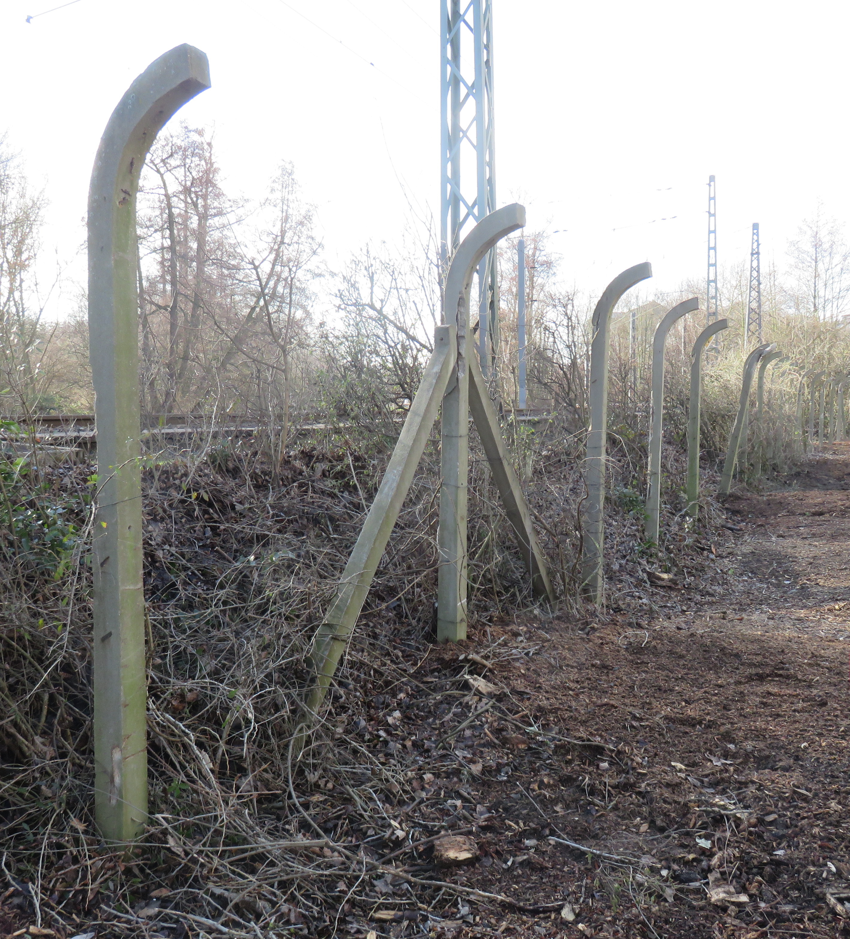 Zaunpfosten aus Beton am Rande des ehemaligen VDM-Werks in Frankfurt am Main-Heddernheim